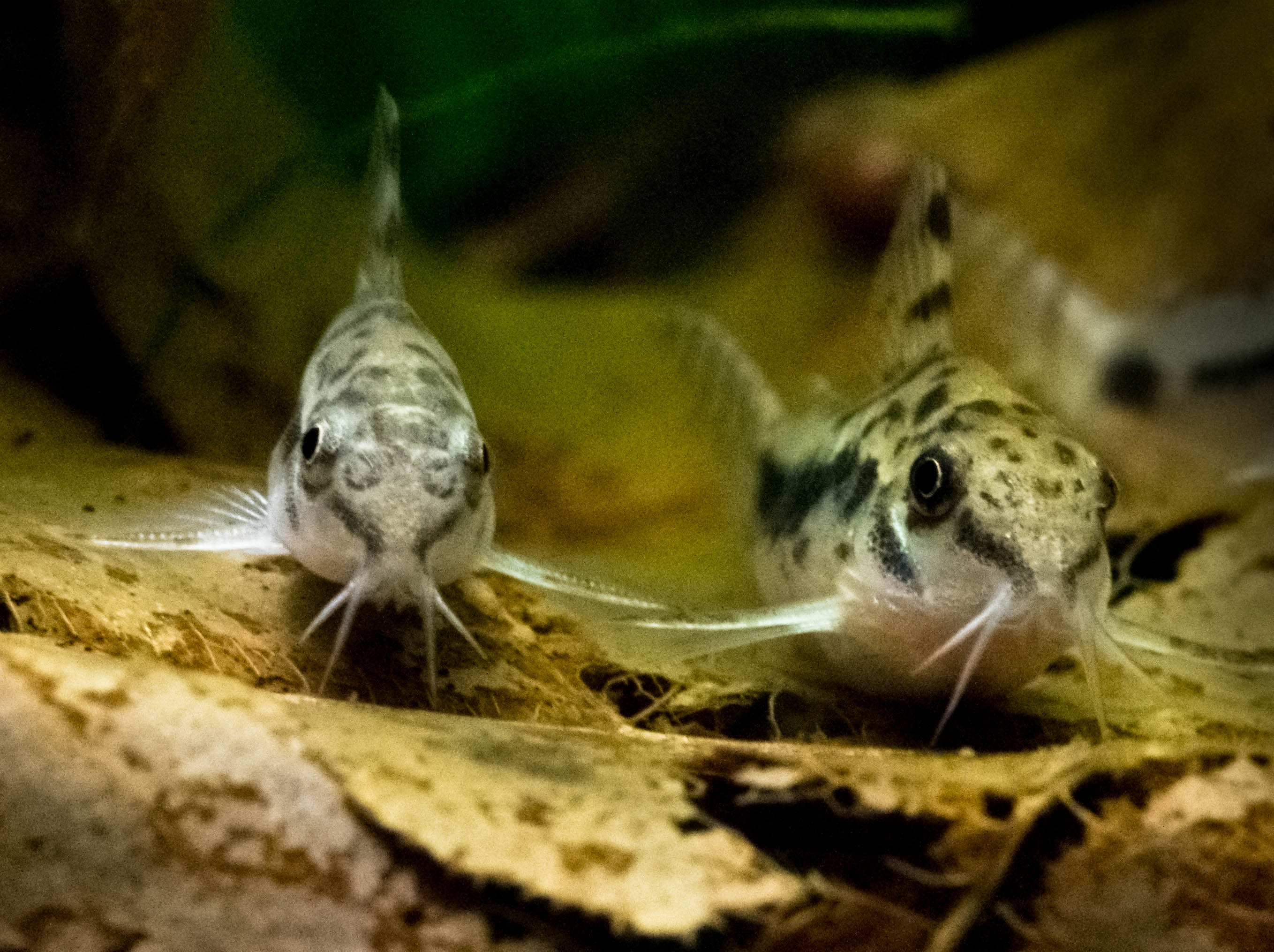 Corydoras habrosus - links ein Männchen, rechts ein Weibchen, hier erkennbar am Größenunterschied